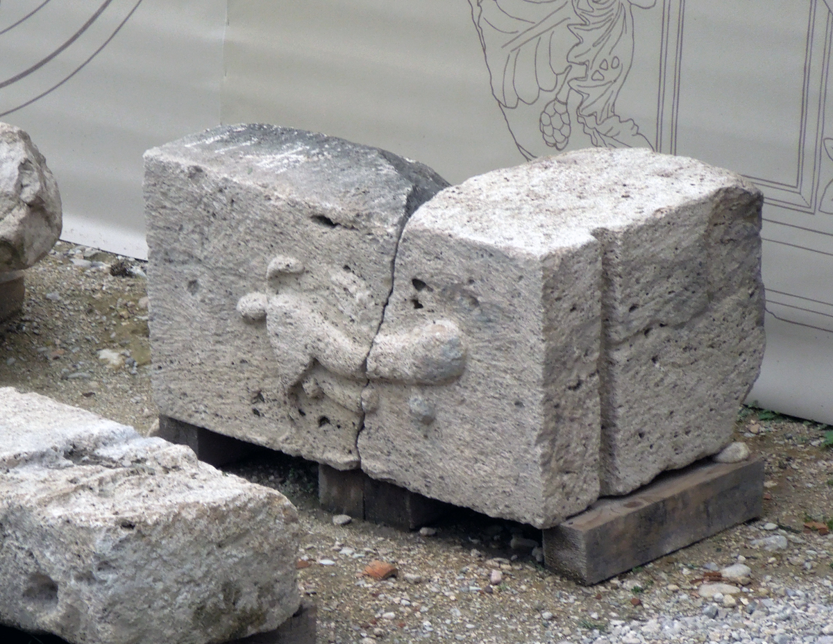 Reperto lapideo in travertino ( cm. 120 X 70) recante un bassorilievo di un fallo alato, rinvenuto all'interno del Teatro romano di Teramo.